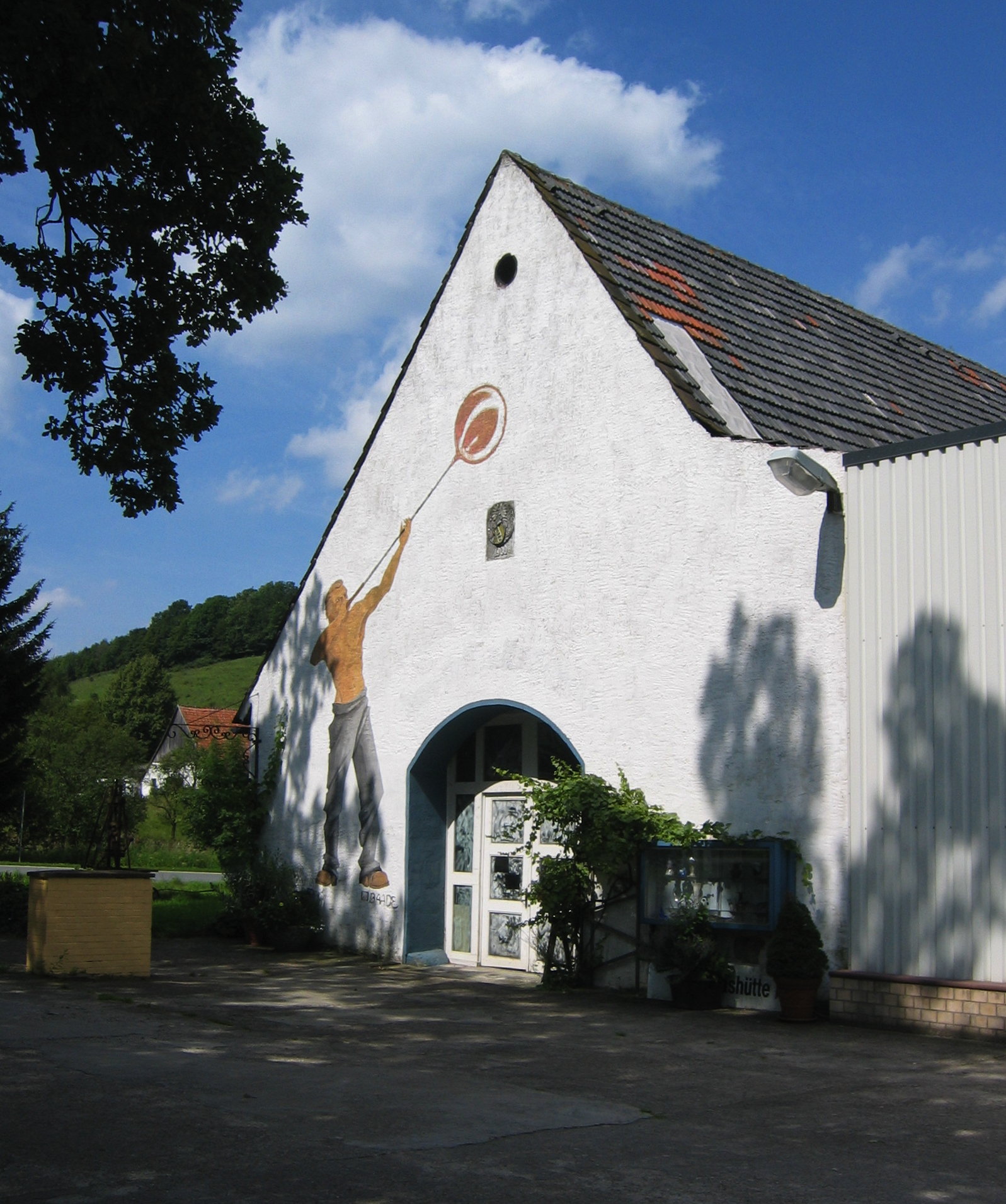 Gebäude der Waldglashütte Erpentrup mit Wandbild eines Glasbläsers in Erpentrup, Bad Driburg, Deutschland.